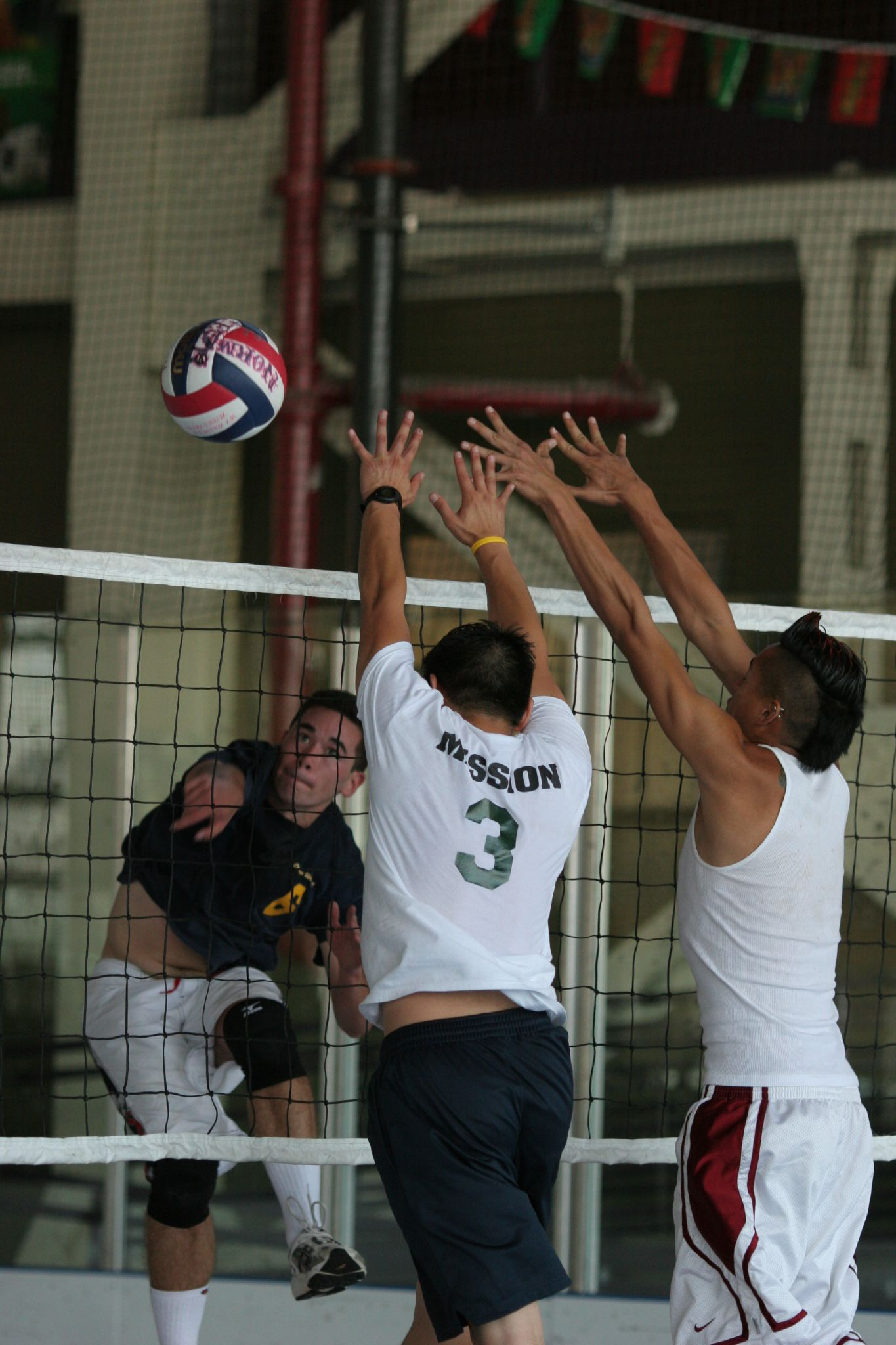 Spike, block, kill...